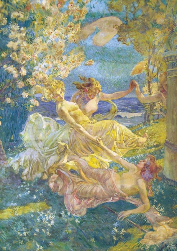 "Три нимфы" 1902 г. Холст, смешанная техника. 230х290